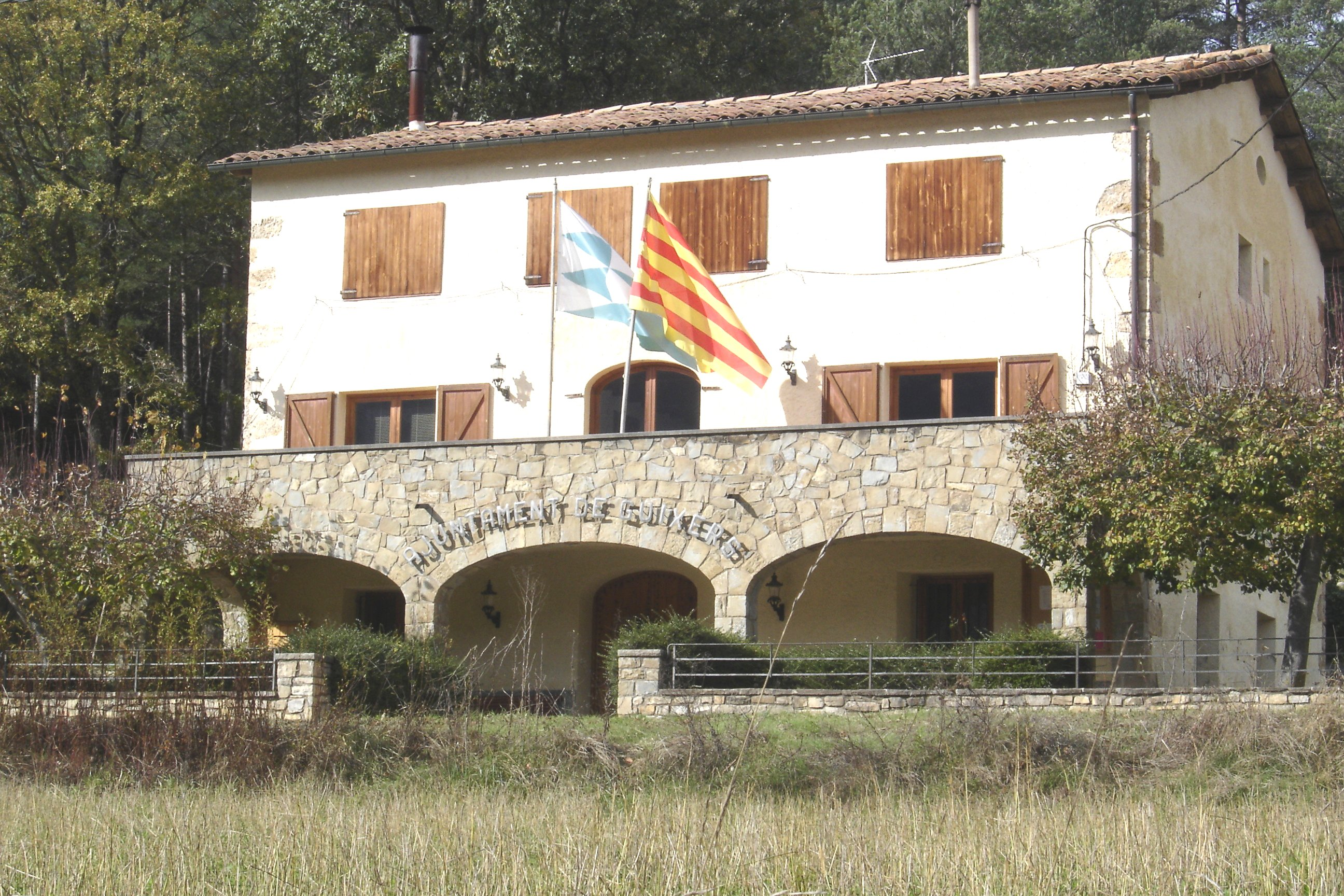 L'ajuntament de Guixers (Solsonès), a les Valls (Lleida, Catalunya)